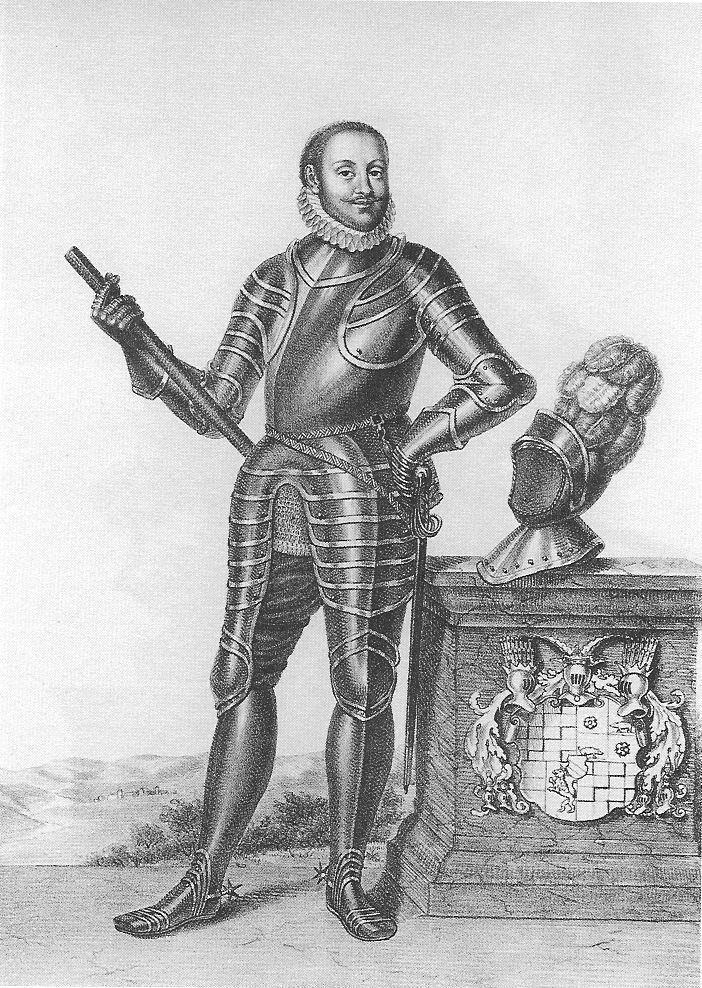 Dieses Bild wurde von seinem Urheber zur uneingeschränkten Nutzung freigegeben oder erreicht nicht die nötige Schöpfungshöhe, um geschützt zu sein. Das Bild ist damit gemeinfrei („public domain“). Uneingeschränkte Nutzung bedeutet, dass das Bild beliebig, auch ohne Namensnennung, verbreitet, kommerziell genutzt und verändert werden darf, in dem Umfang, der in der jeweiligen nationalen Rechtsordnung möglich ist